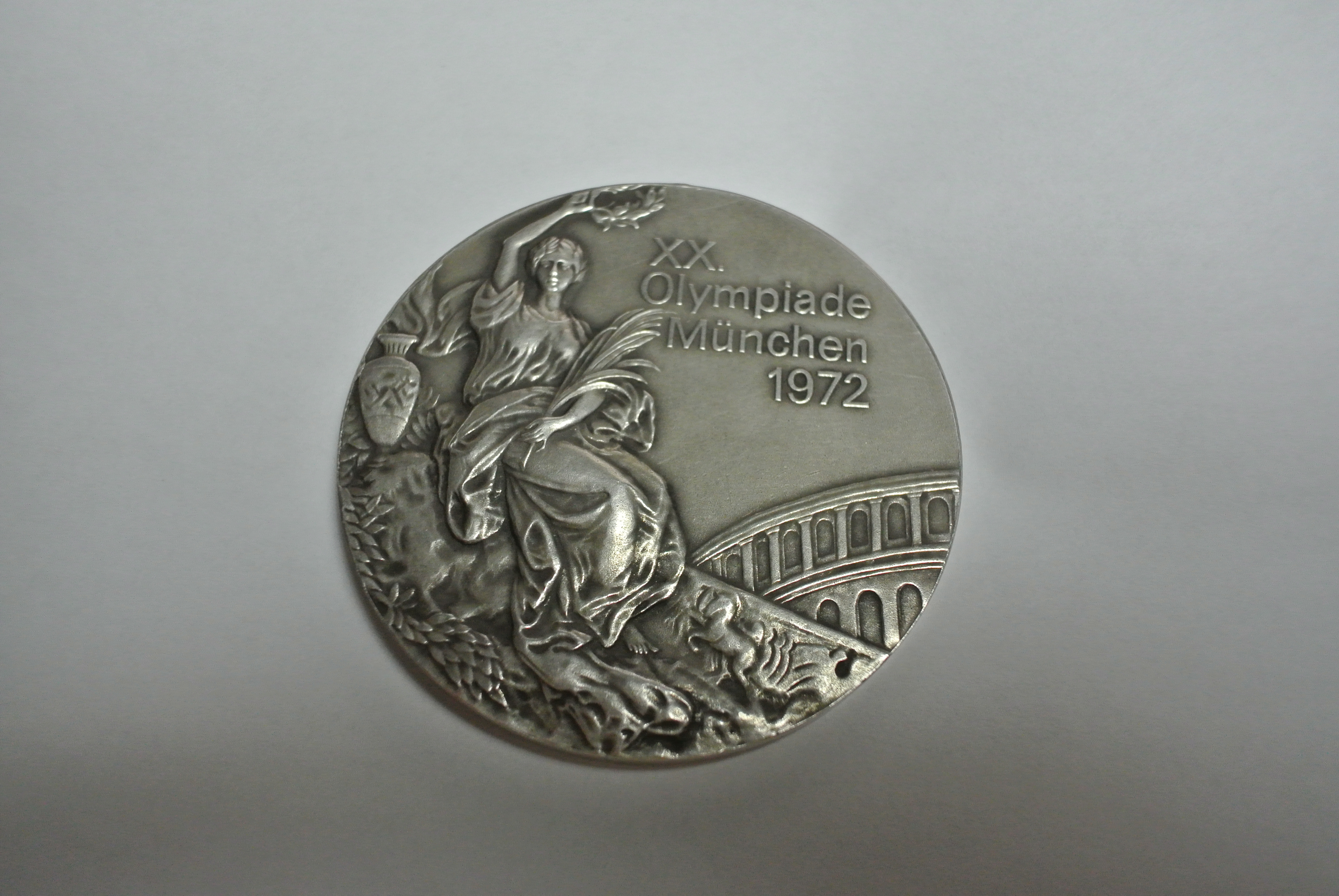 vzhled stříbrné medaile z LOH 1972 MNICHOV - Házená - SPORTOVEC p. Jaroslav Konečný